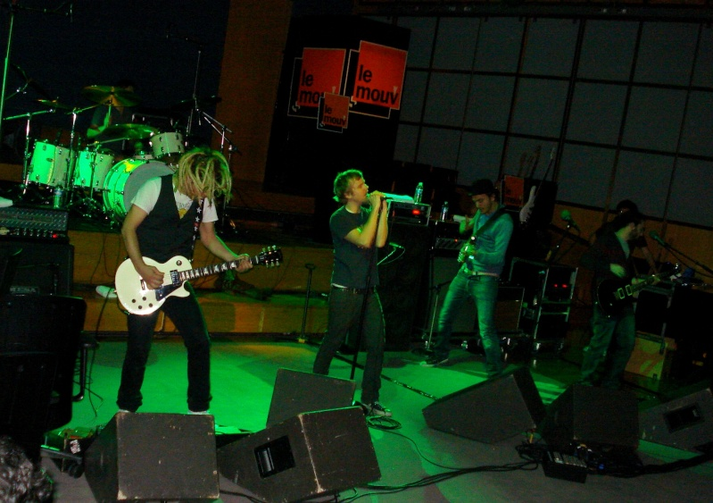 Empyr en concert dans la Mouv' Session